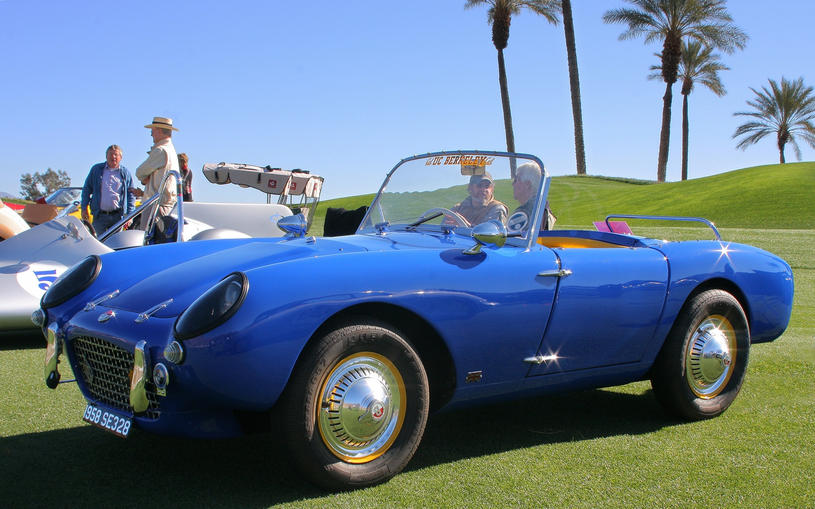 1958 Berkeley - fvl